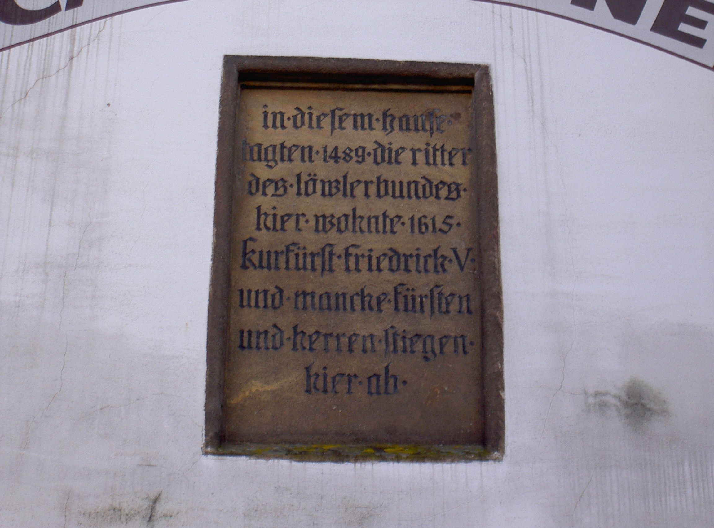 Cham Marktplatz 4 ehemaliger Gasthof Krone